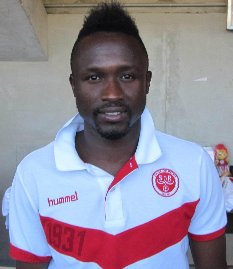 CA Bocandji